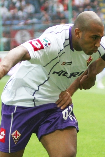 Reginaldo Ferreira da Silva for Fiorentina in 2007